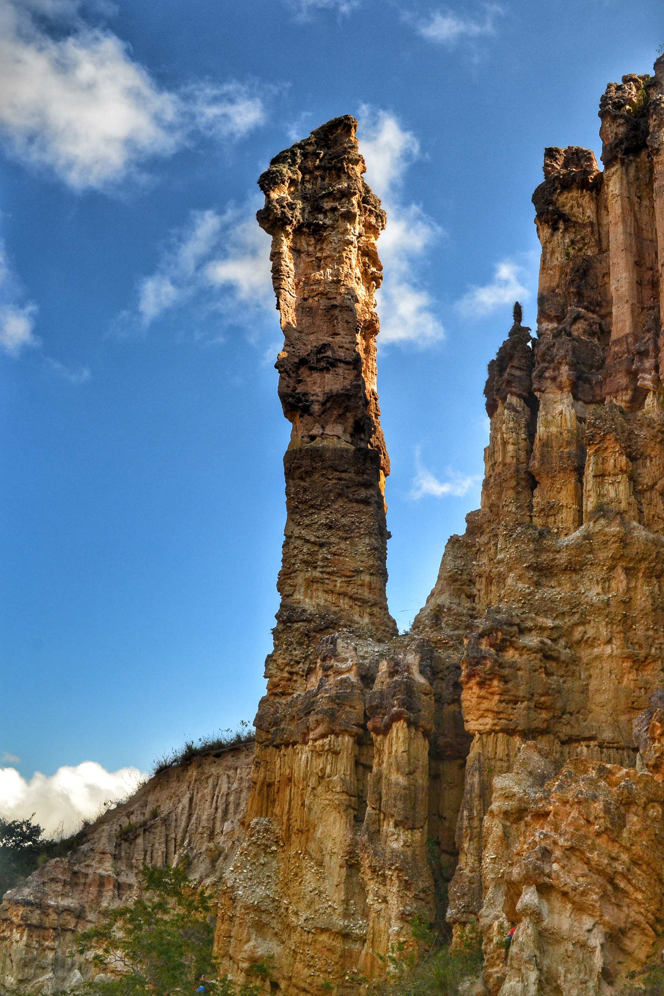 Área Natural Única Los Estoraques Esta fotografía fue tomada en un área protegida de Colombia con el código 17 del RUNAP.